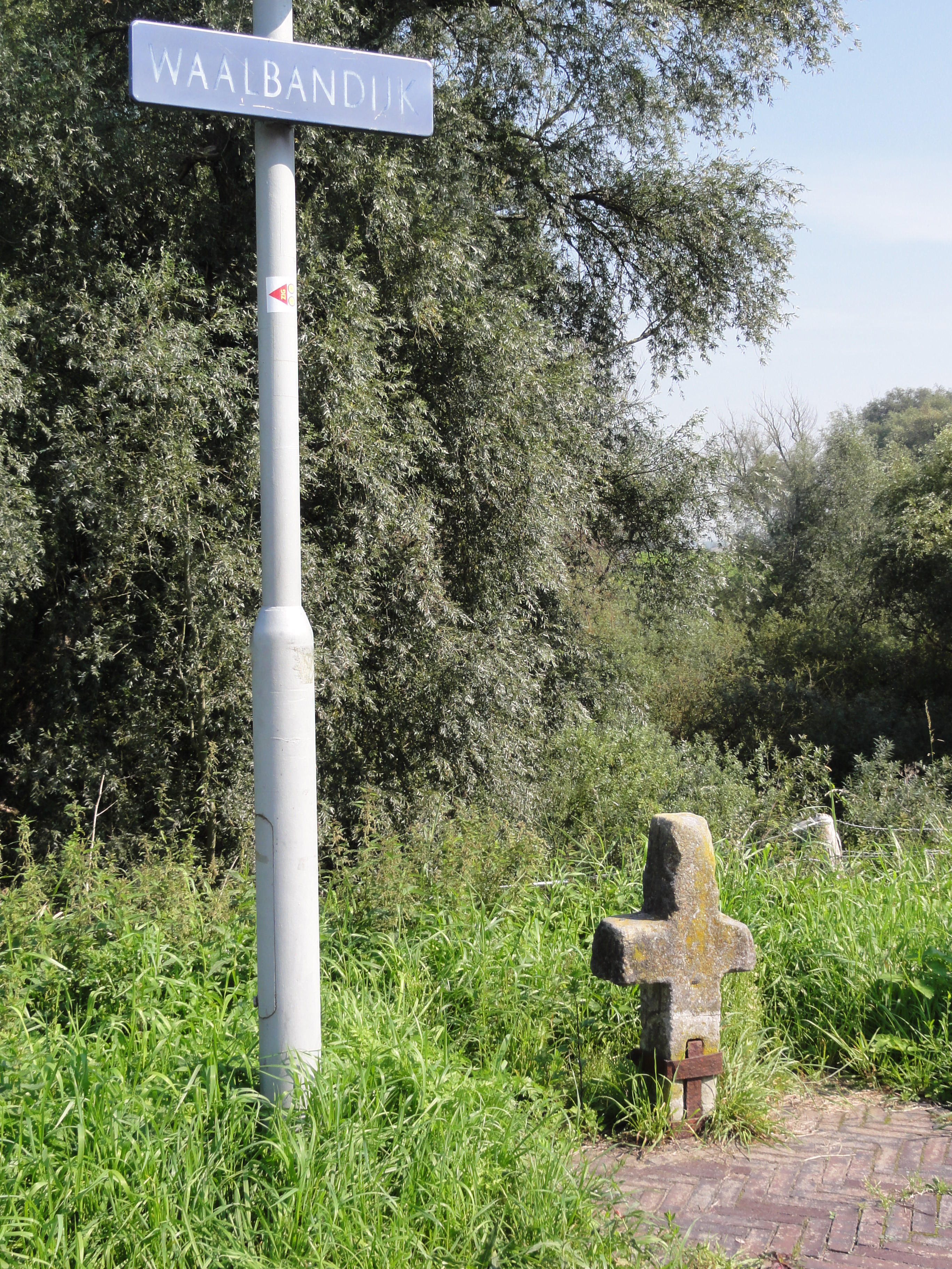 Druten, doodslagkruis (moordkruis) aan Waalbandijk (uit 1542)